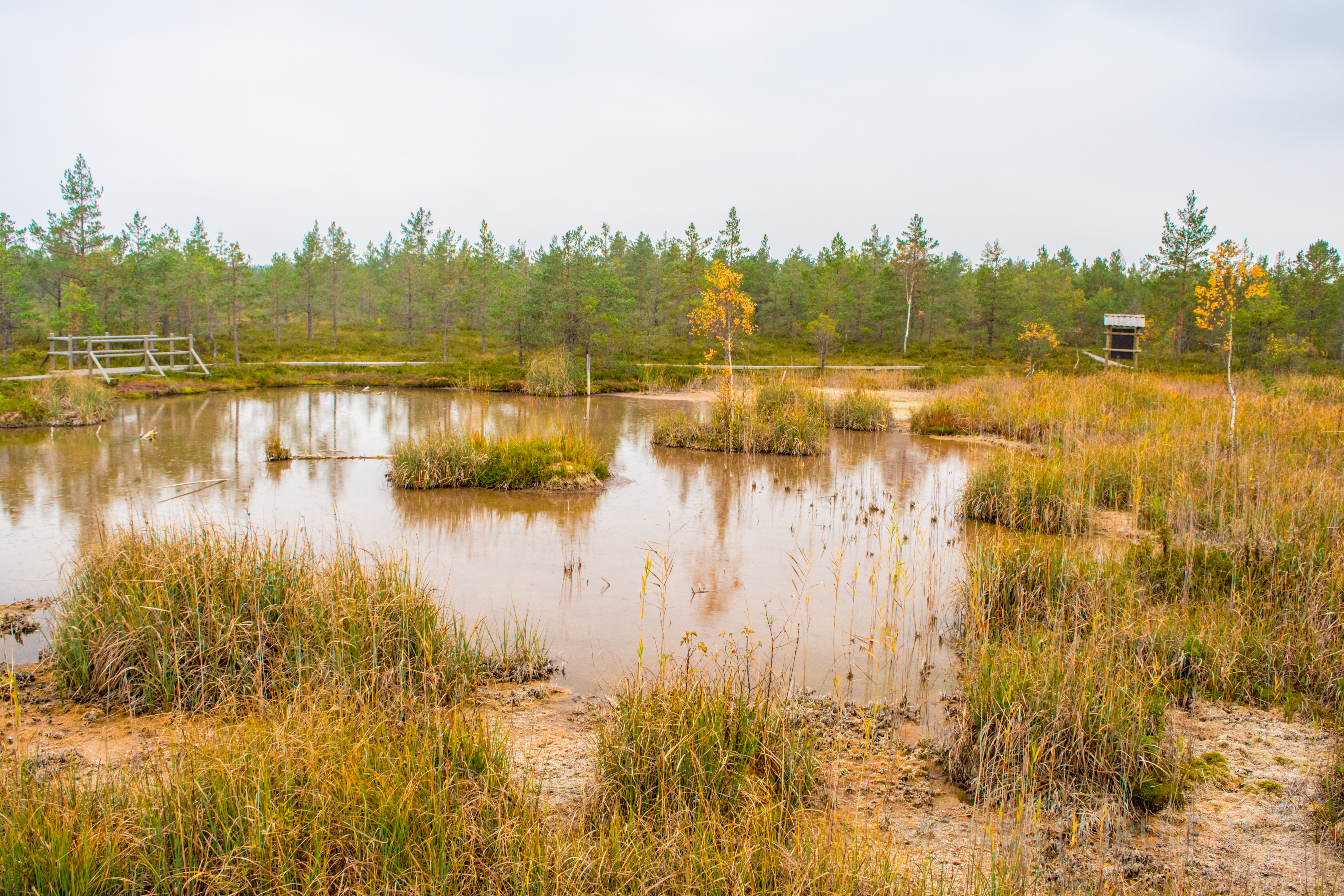 Ķemeru nacionālais parks